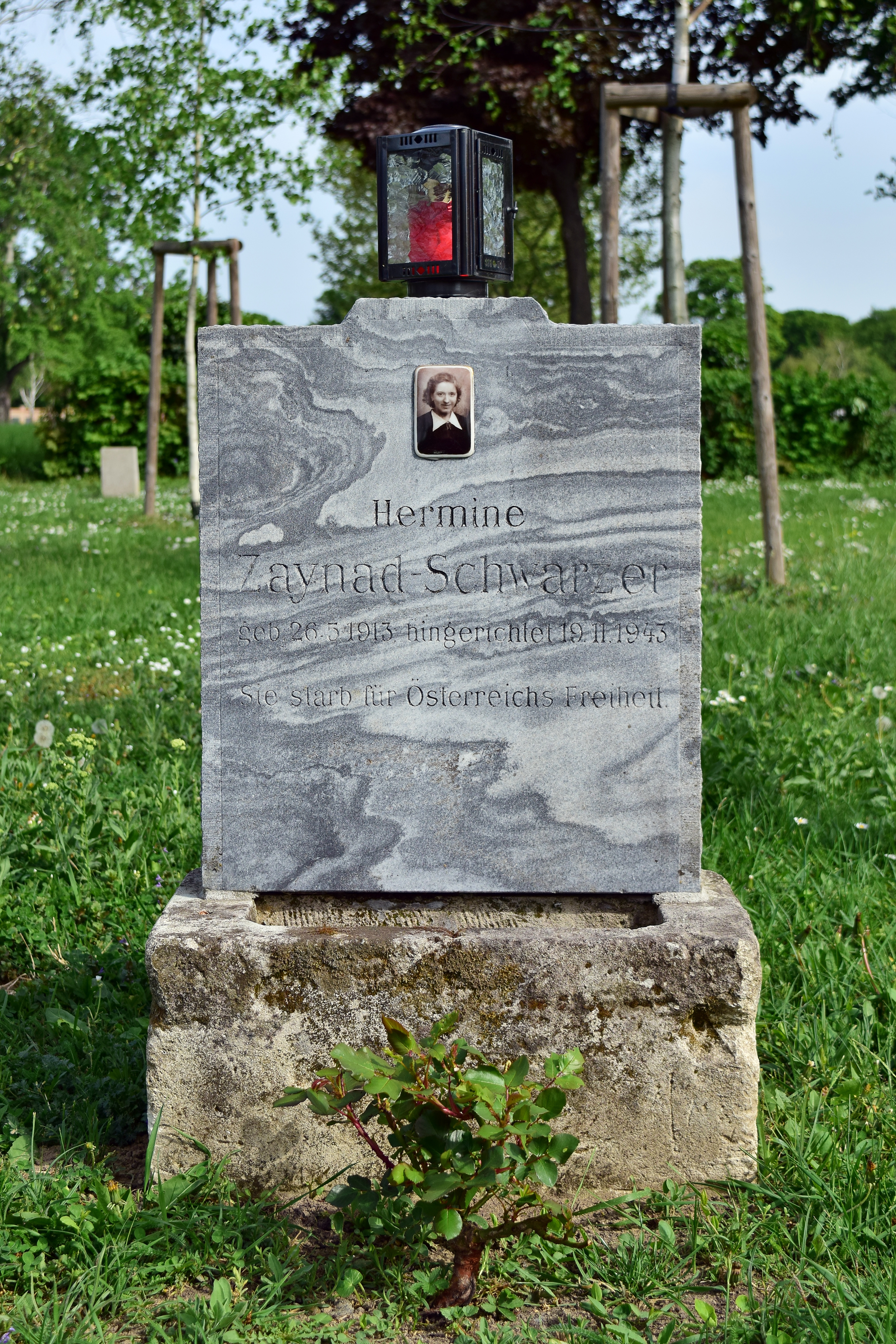 Gesamtanlage, Zentralfriedhof